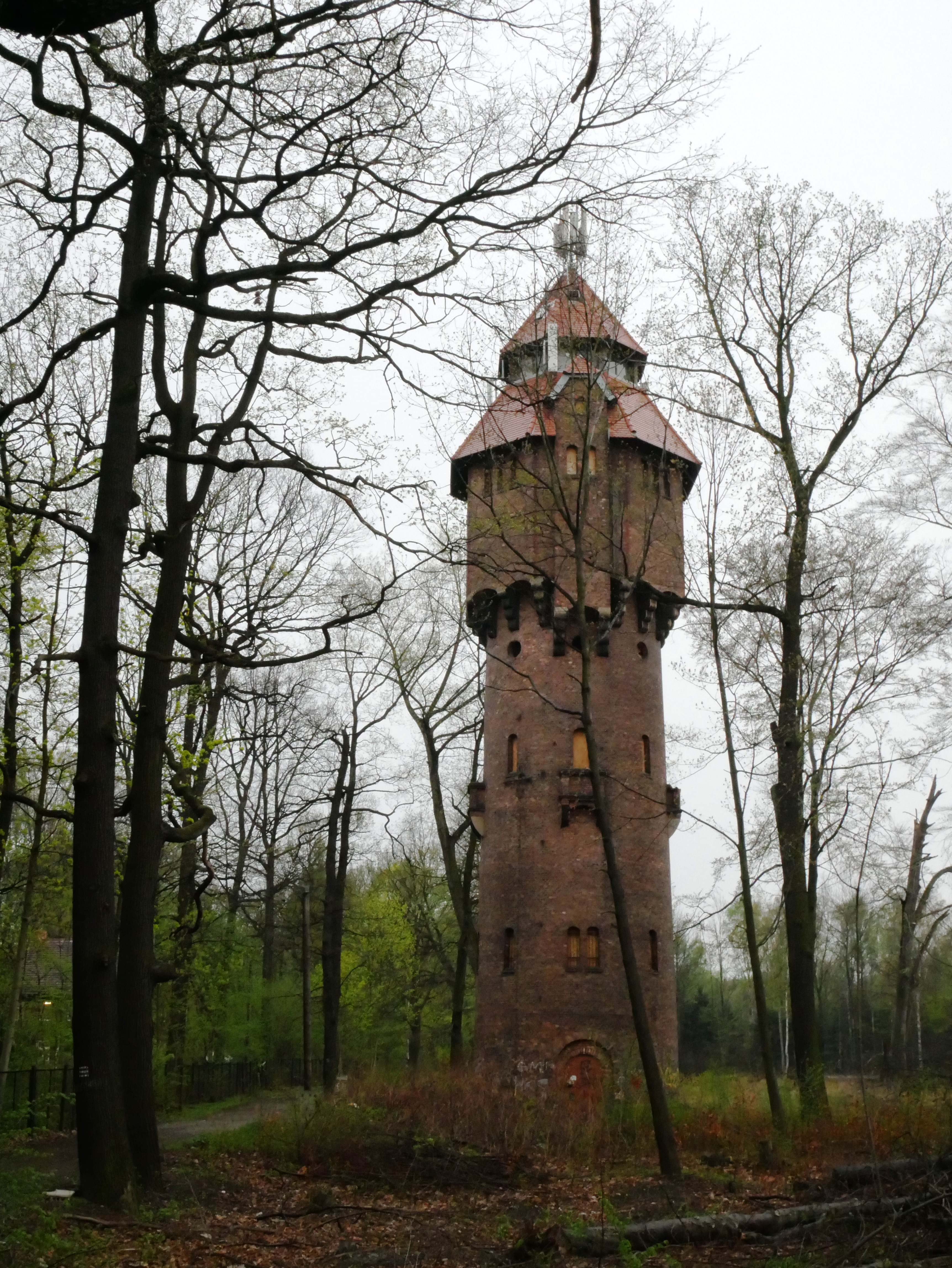 Wieża ciśnień w Katowicach Giszowcu